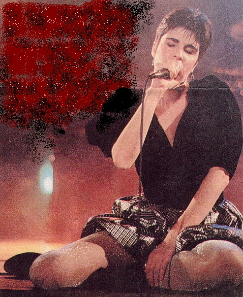 88 aula magna